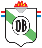 Insignia del Colegio Monseñor Lasagna de Asunción del Paraguay